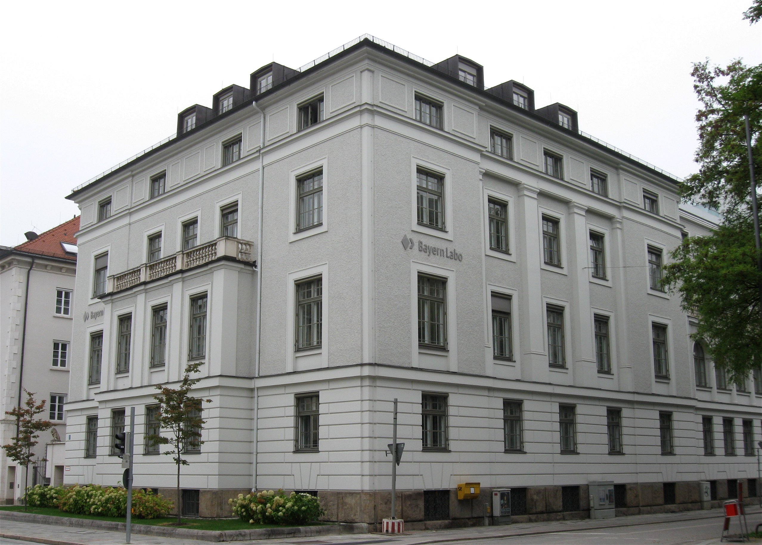 Brienner Straße 22; Palais Berchem, jetzt Verwaltungsgebäude der Bayerischen Landesbank, 1897–98 von Gabriel von Seidl; vereinfachte Wiederherstellung nach Kriegsschäden; Treppenhaus mit Stuckdekor erhalten; 1927 und 1933 erweitert.